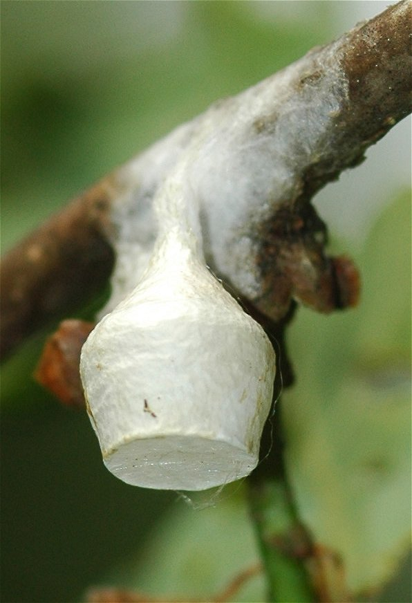 Agroeca brunnea (Feenlämpchenspinne), Kokon aus einer Eichenkrone in Nordwestdeutschland